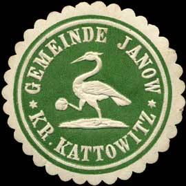 Sealing stamp Title: Gemeinde Janow Kr. Kattowitz Description: grün, weiß, geprägt Place: Janow/Kattowitz size: 4 cm